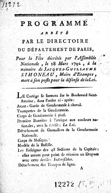 Programmes des fêtes en l'honneur de Jacques Guillaume Simonneau, maire d'Etampes assassiné, extrait de : Anonyme. Fêtes et cérémonies révolutionnaires, French Revolution, Paris Famille Mottet